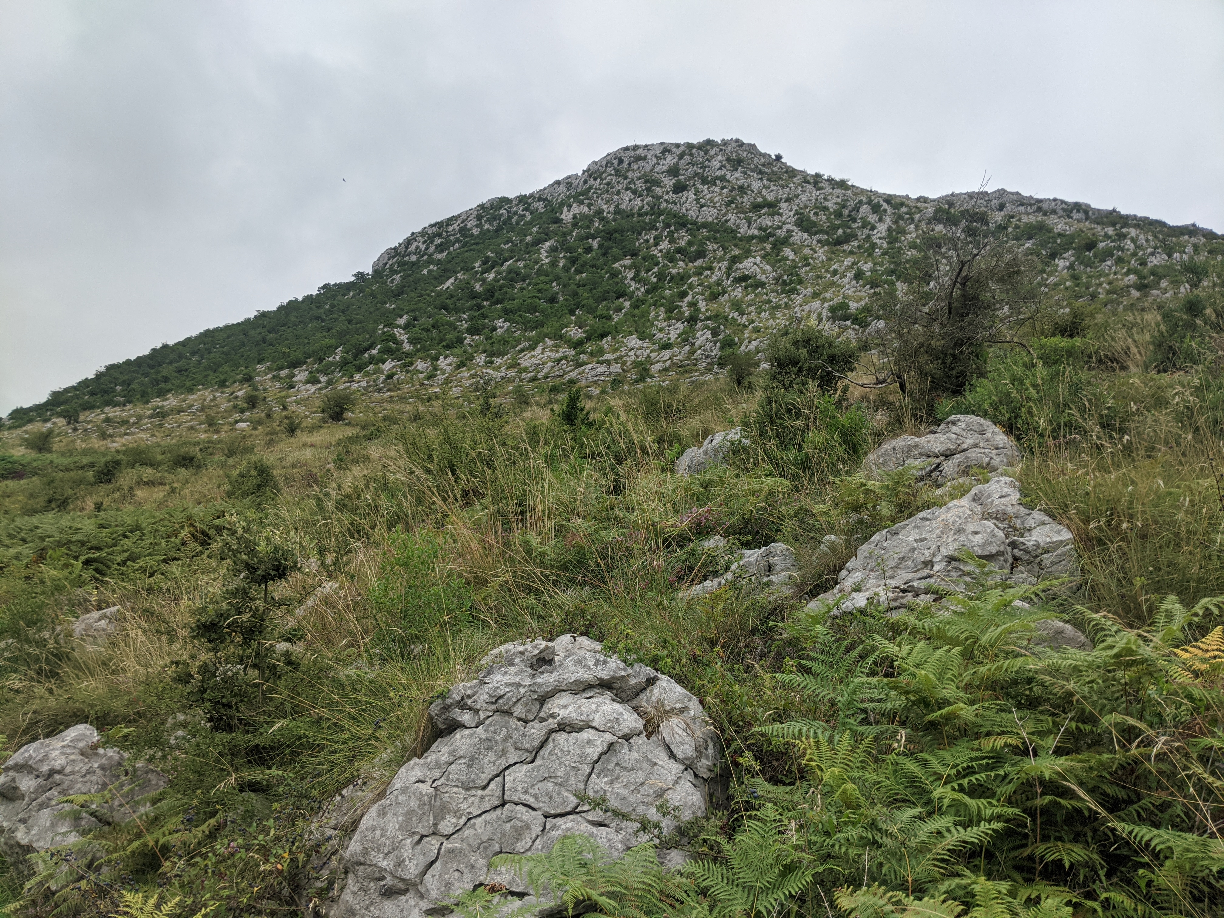 Pozalaguako haitzulo edo lezea Ranero Haitzpean kokatua dago.